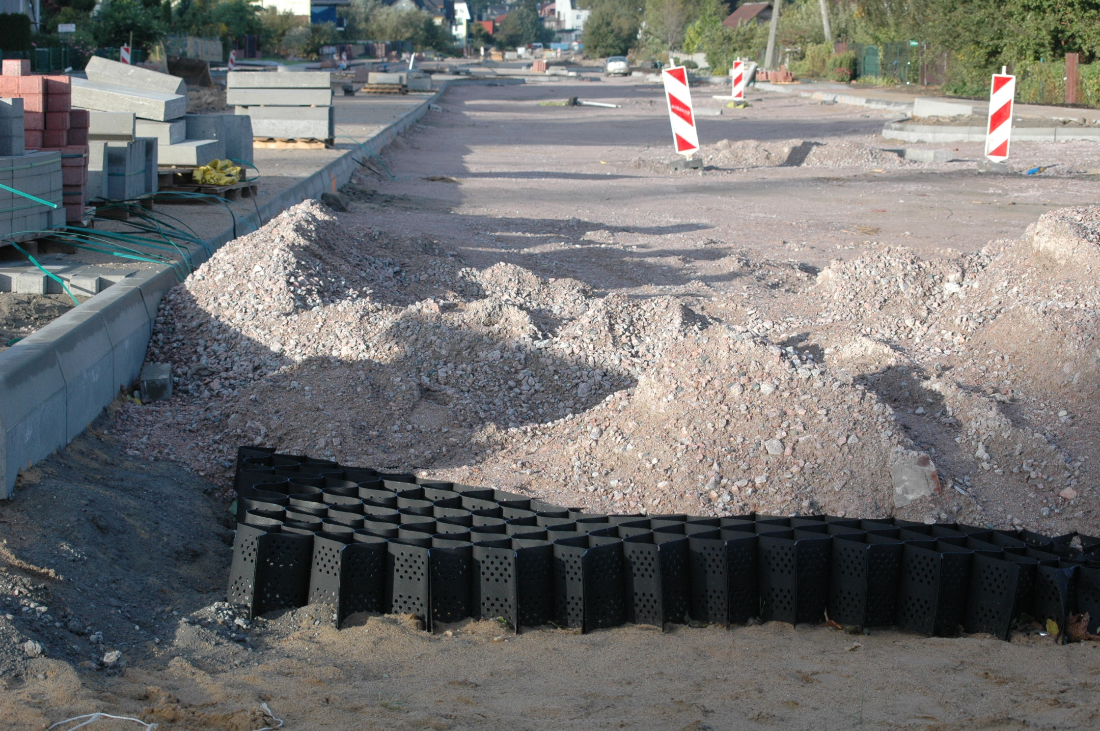 Geosiatka przy budowie ulicy Nowomyśliwskiej w Międzyzdrojach.